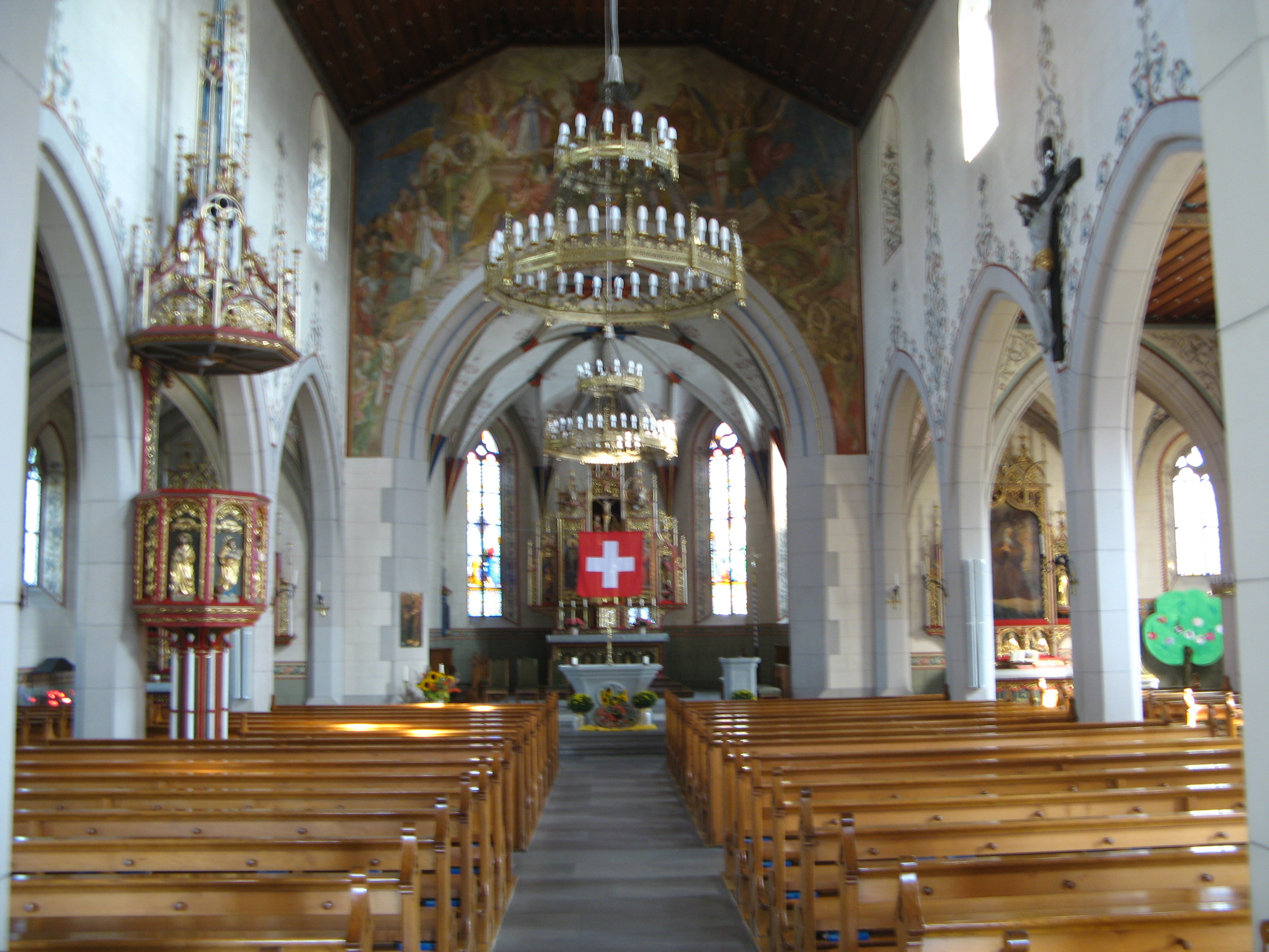 Pfarrkirche St. Vitus in Merenschwand, Innenansicht